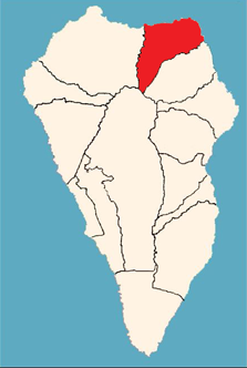 Localización municipio Barlovento